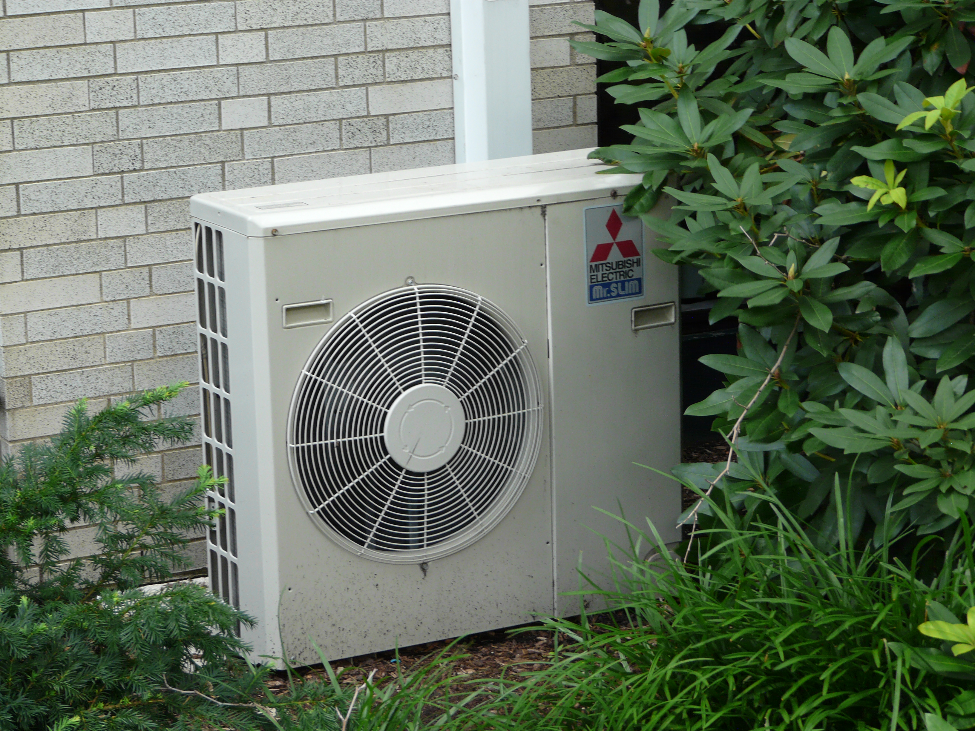 Boston